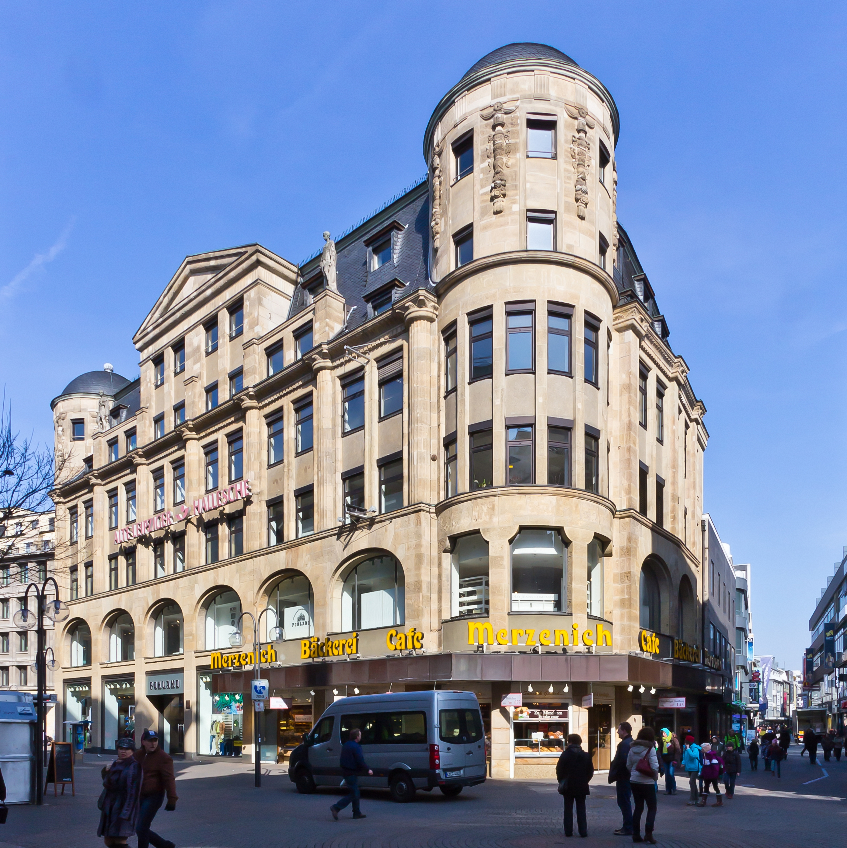 Denkmalgeschütztes Geschäftshaus Palatium. Südostseite Ecke Gürzenichstraße/Hohe Straße. Architekt: Wilhelm Kreis